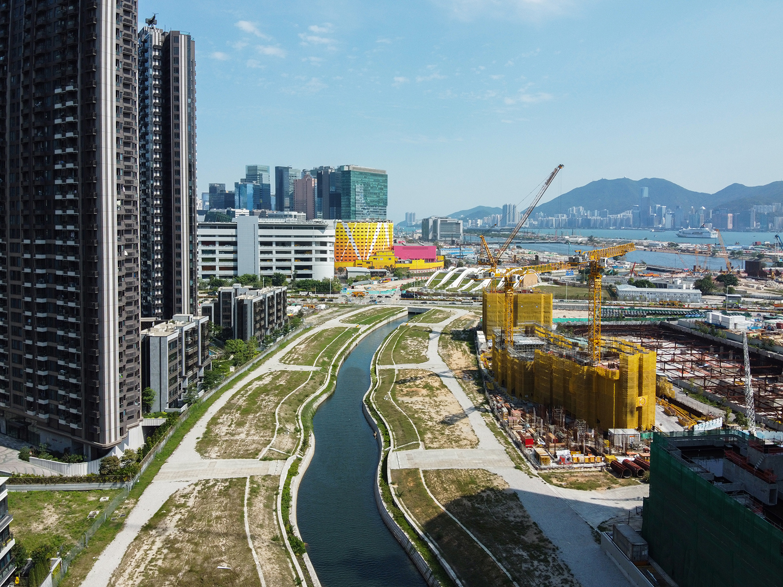 Kai Tak River